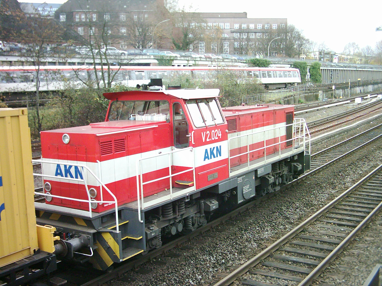 Hamburg: Lokomotive V2.024 der AKN Eisenbahn zieht eine Bettungsreinigungsmaschine in Höhe der Ausfahrt des Bahnhofes Berliner Tor.